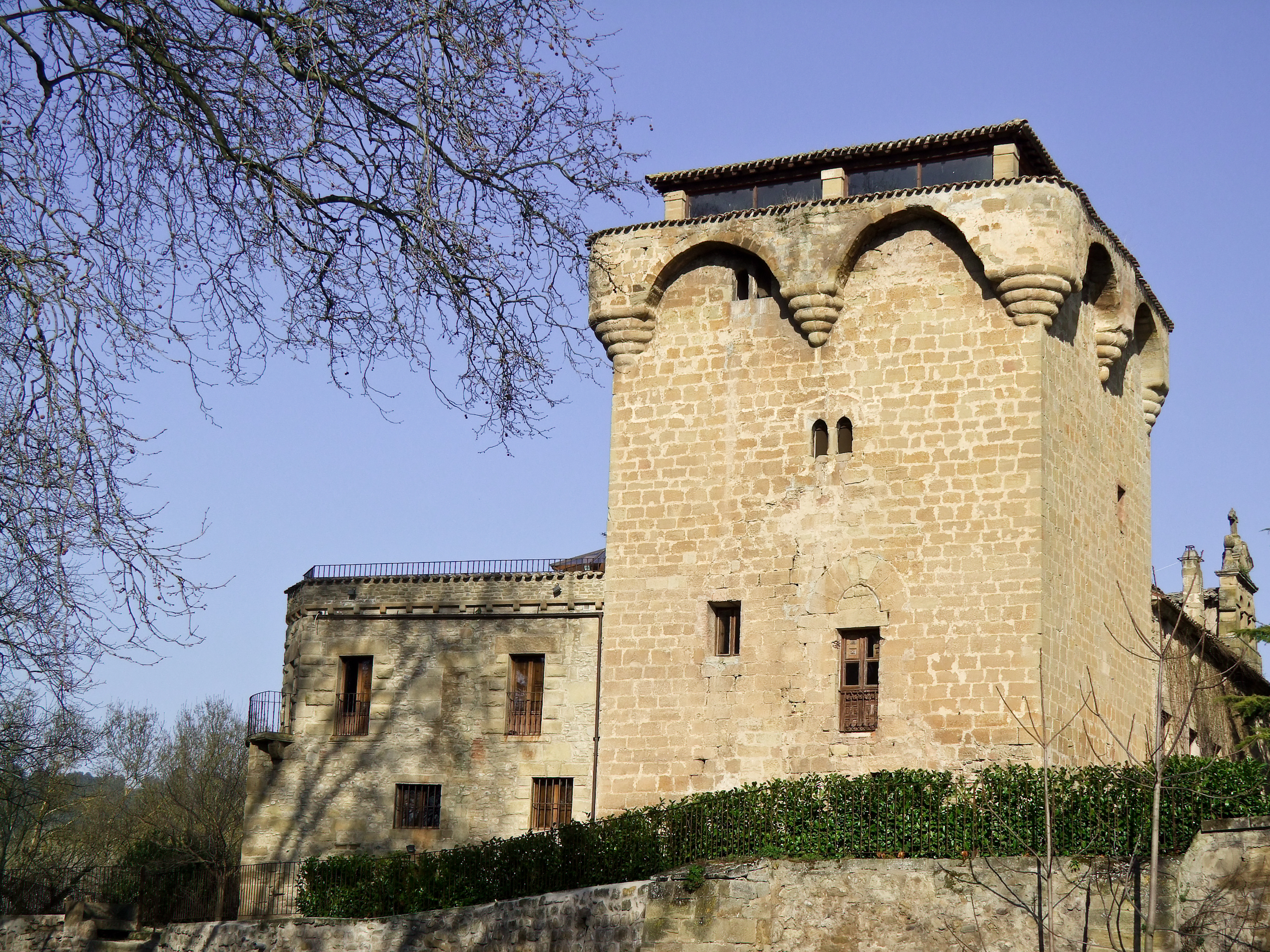 Torre Fuerte en la localidad de Torremontalbo, La Rioja - España